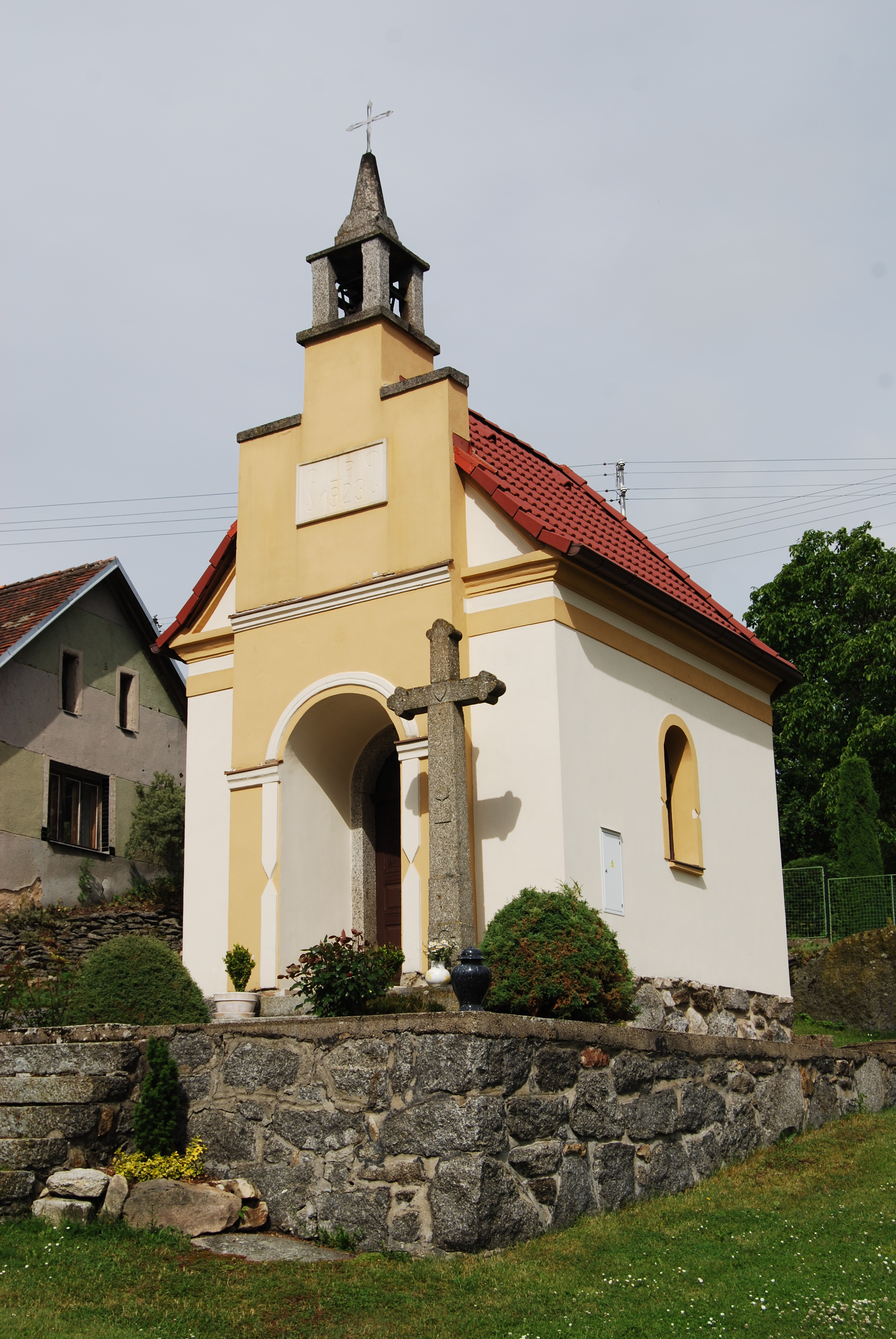 Návesní kaple a kříž. Záluží je část obce Chyšky v okrese Písek. Česká republika.